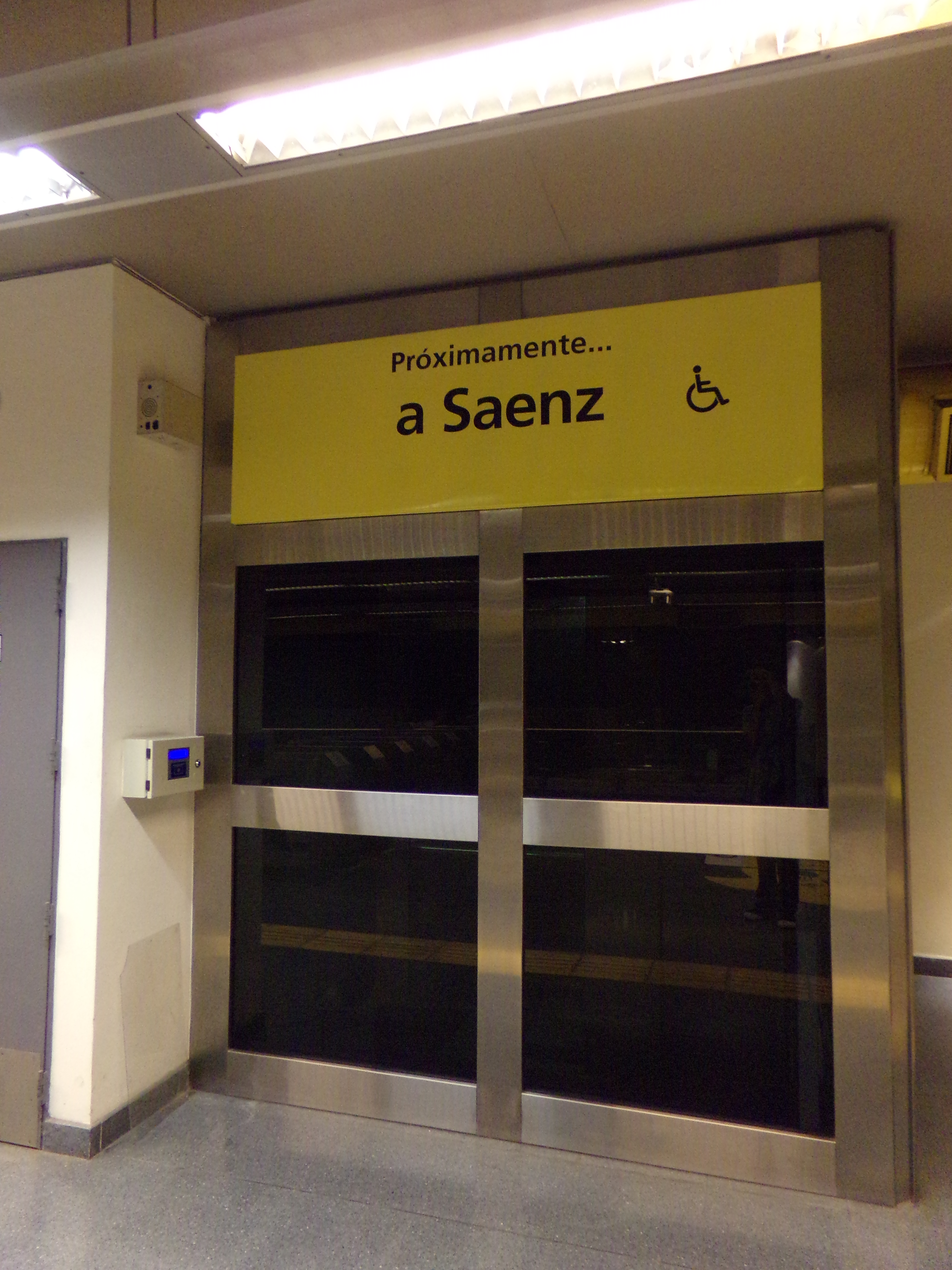 Ascensor en la estación Hospitales anunciado la extensión a Sáenz